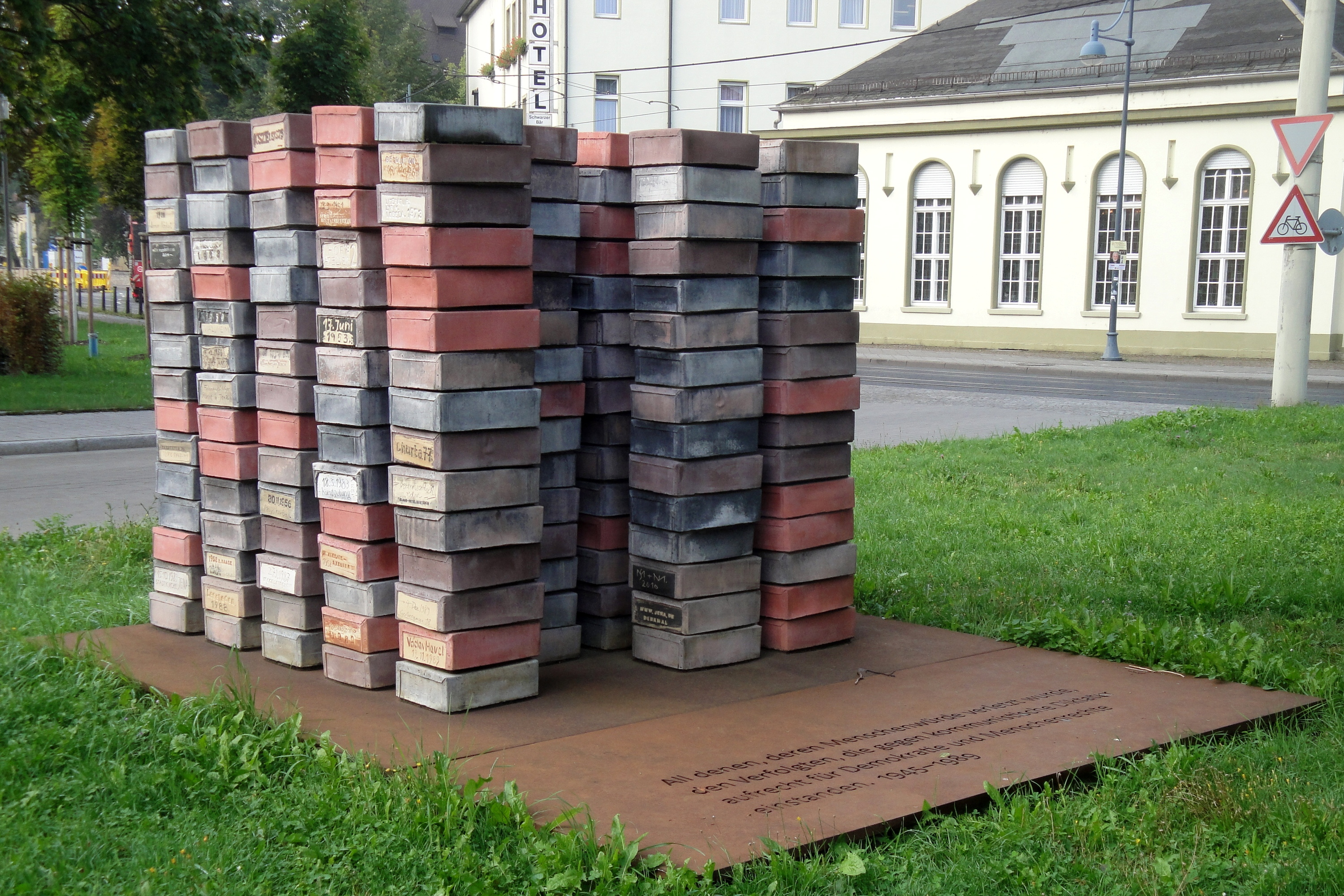 Denkmal für die politisch Verfolgten 1945–1989, Saalbahnhofstraße/Ecke Gerbergasse, Jena All denen, deren Menschenwürde verletzt wurde, den Verfolgten, die gegen kommunistische Diktatur aufrecht für Demokratie und Menschenrechte einstanden. 1945–1989